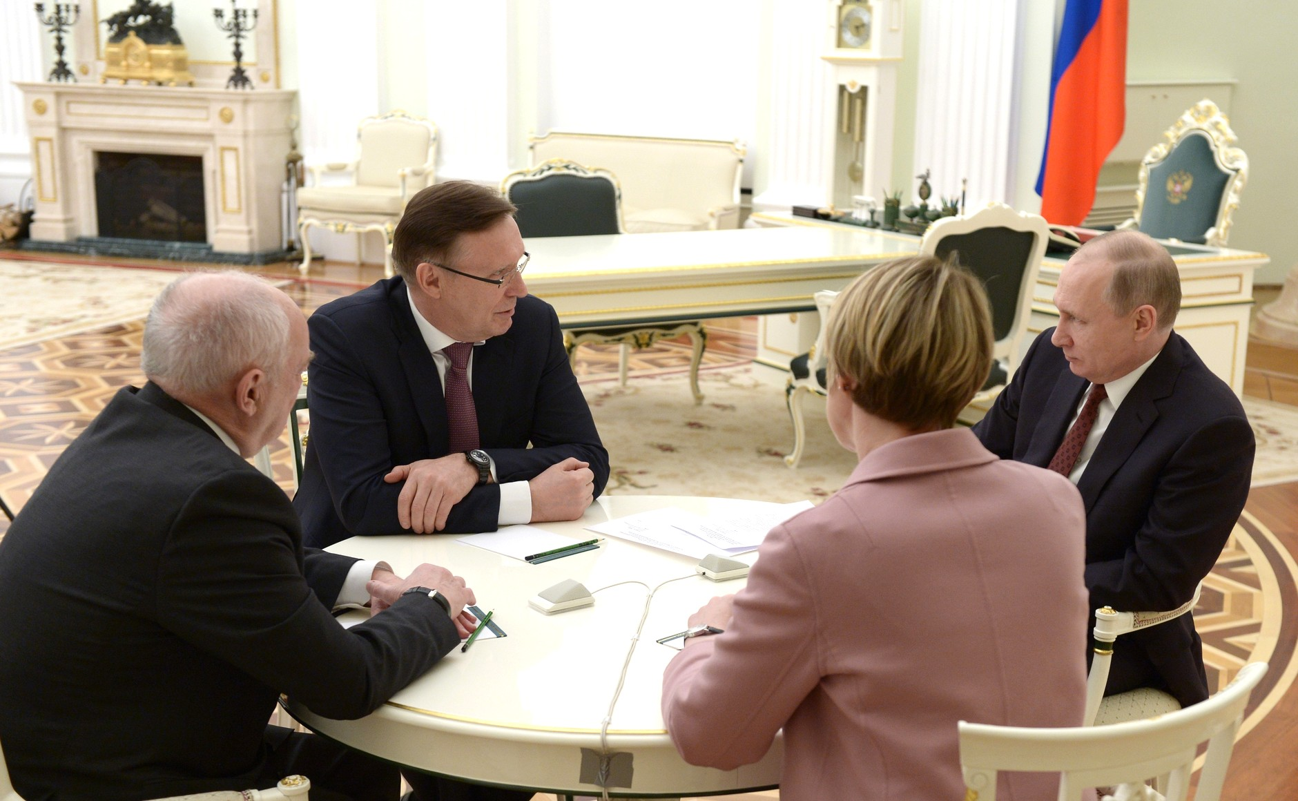 Встреча с Сергеем Когогиным, Александром Румянцевым и Еленой Шмелёвой